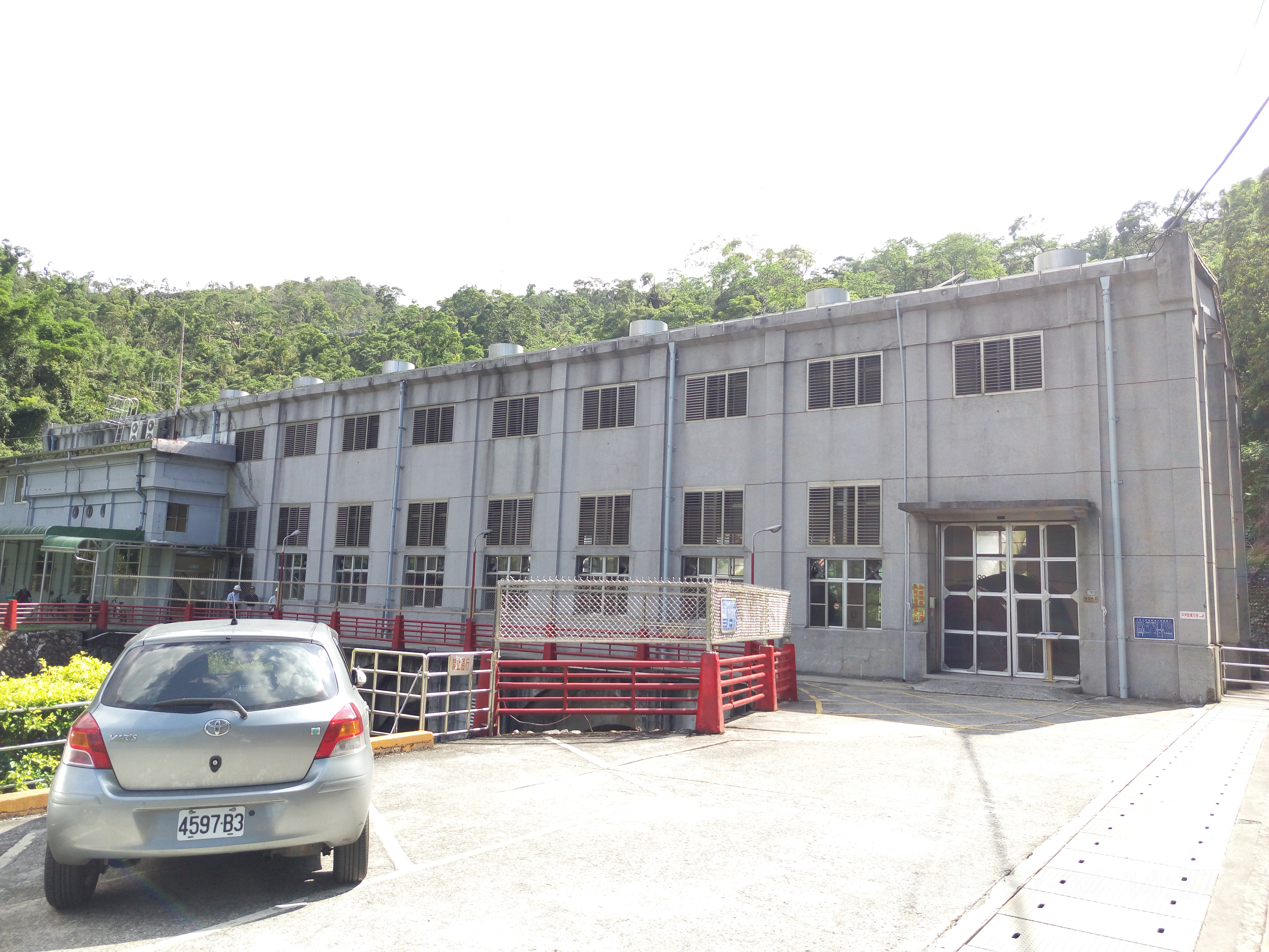 蘭陽發電廠天埤機組廠房外觀